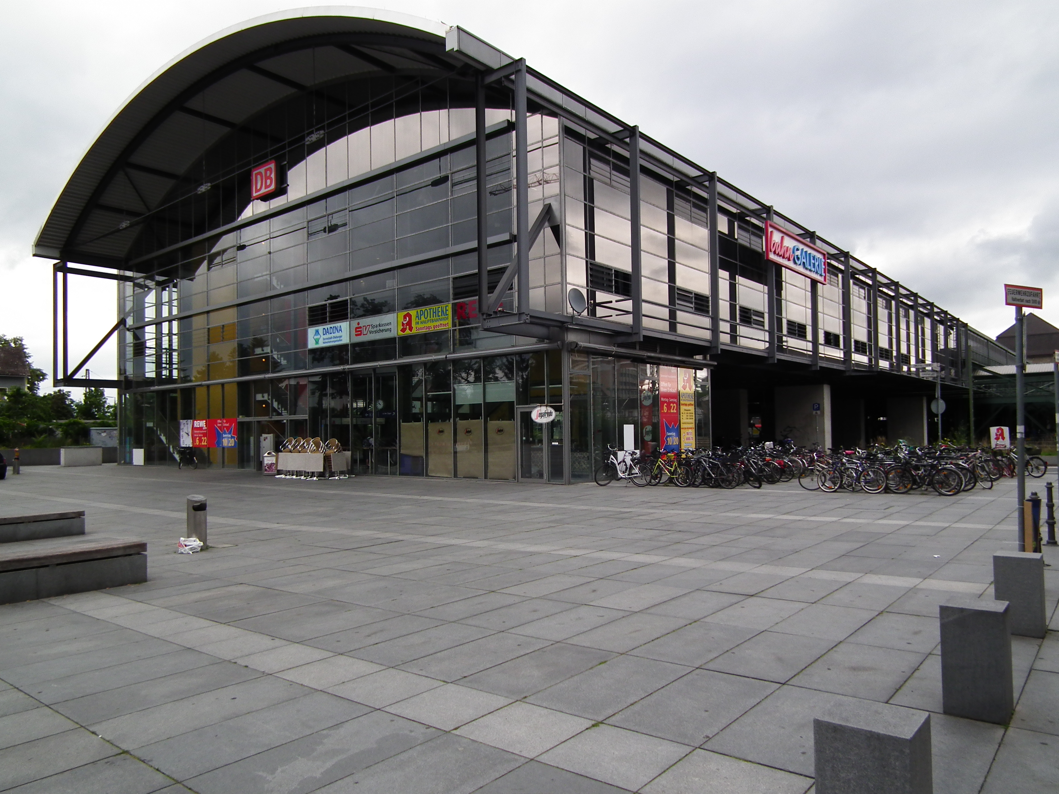 Bahngalerie am Hauptbahnhof Darmstadt (Hessen, Deutschland)